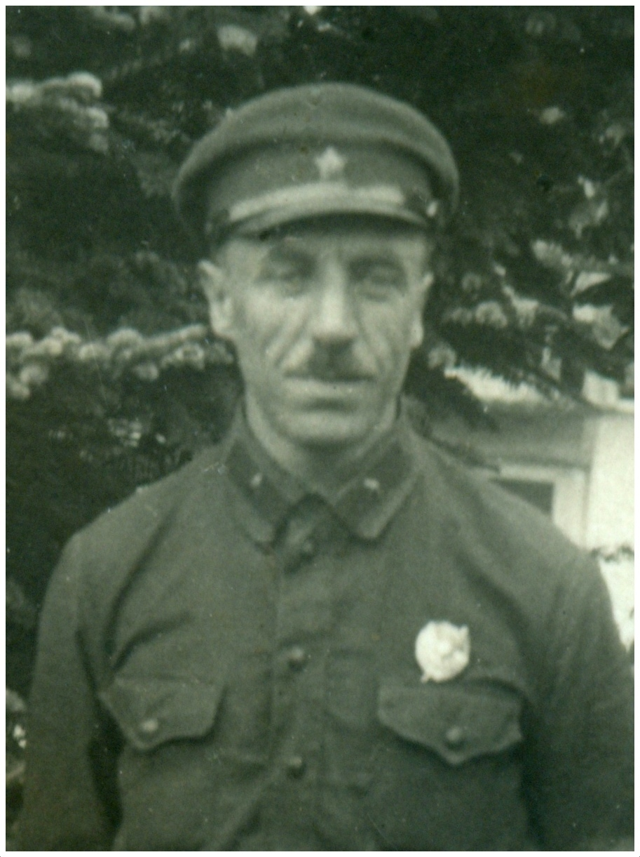 Сотрудник Управления ПВО НКВТ СССР Горчаков Г.С. (воинская категория К-10)